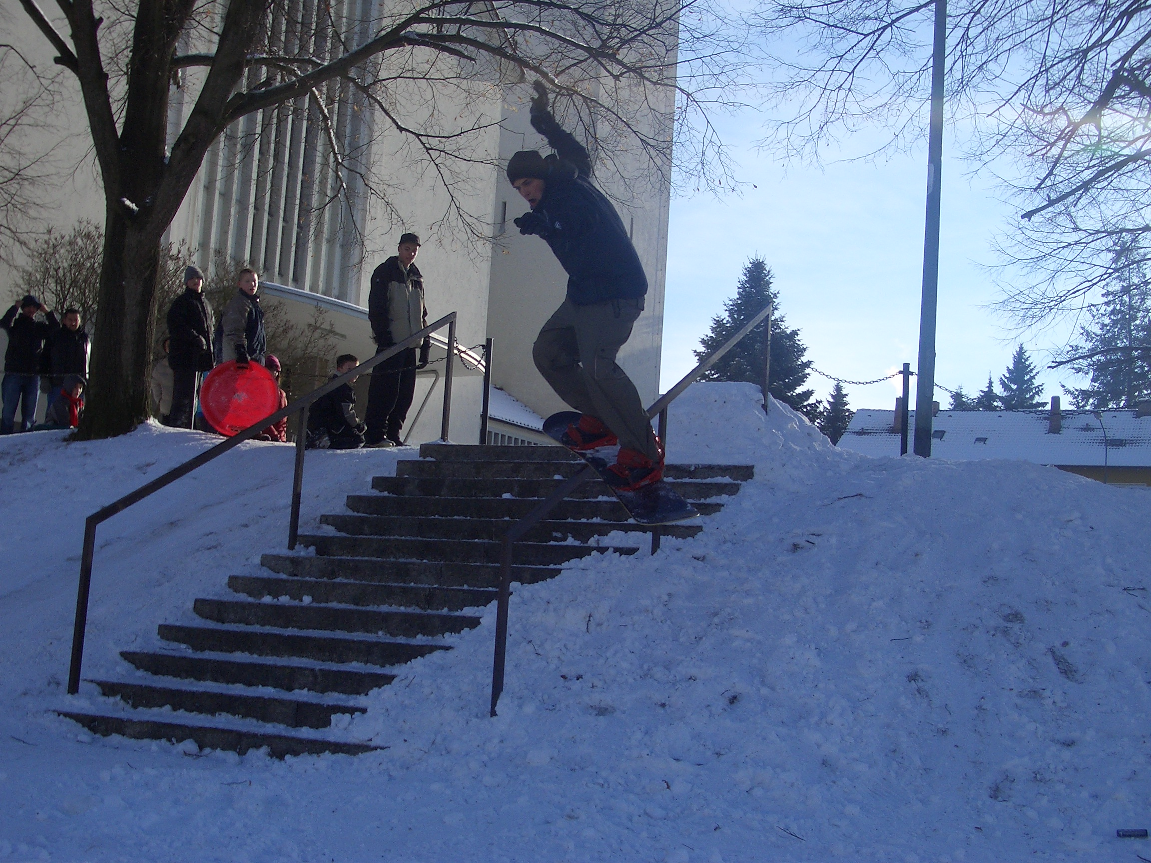 Frontside Boardslide